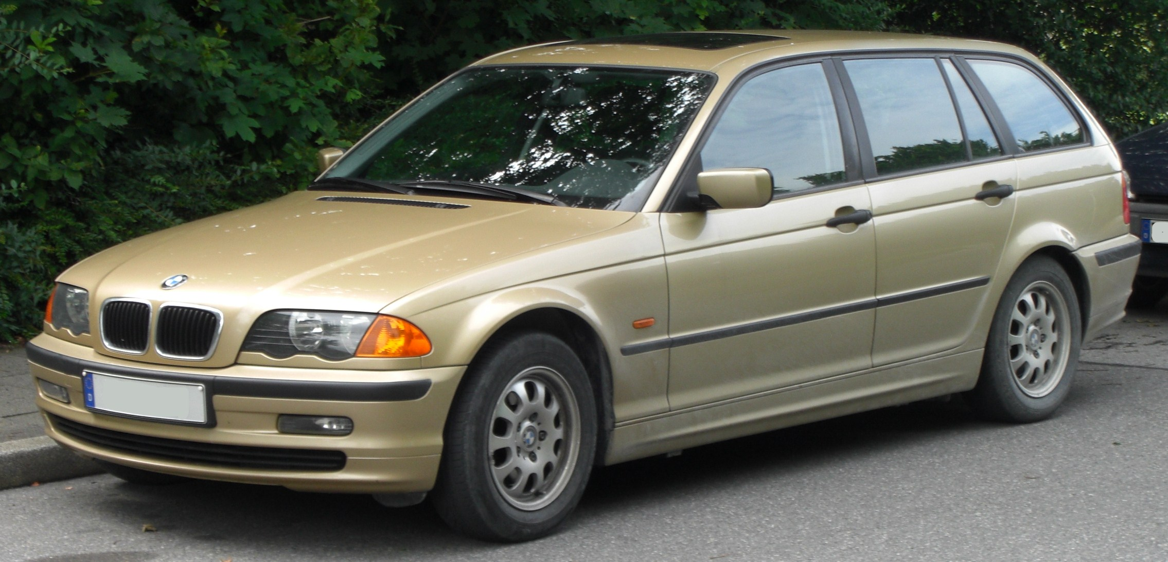 BMW 3er touring (E46)